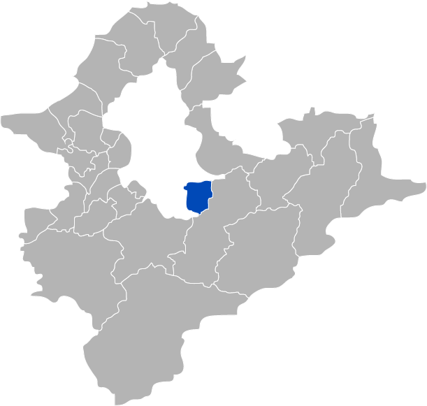 KaurJmeb為編寫中華民國臺灣省臺北縣深坑鄉，於2005年2月6日所繪。